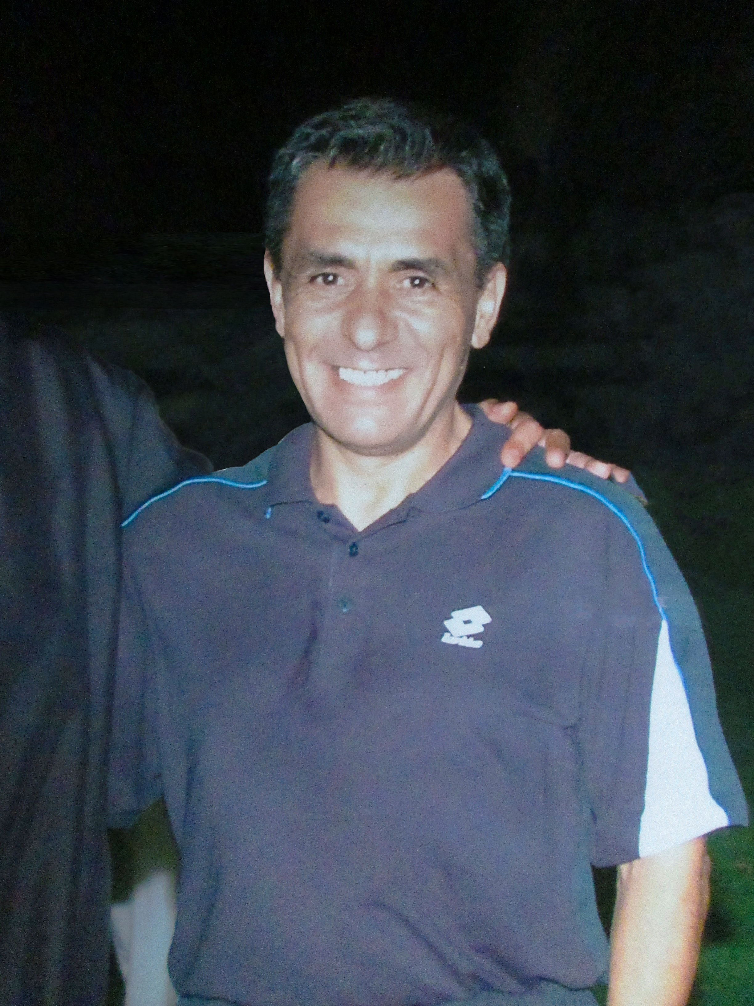 Gezim Ljalja kao trener klub Al-Sawadija u Omanu